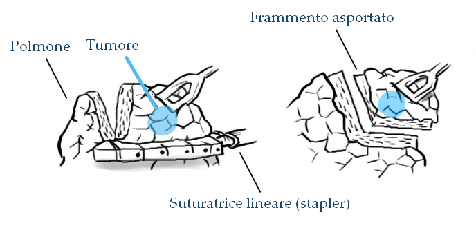 Wedge resection. Una tecnica di escissione di tumore polmonare confinato.